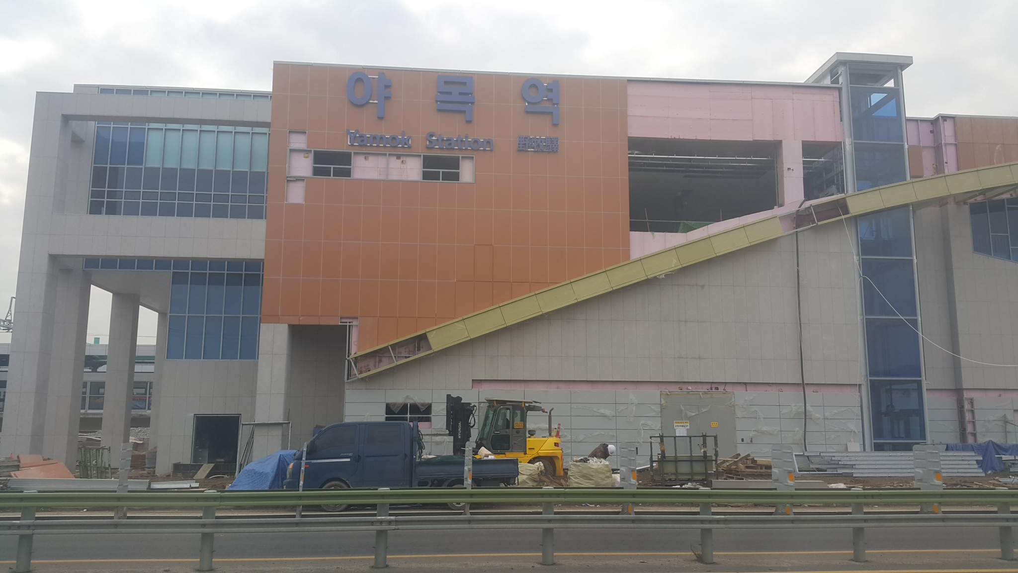 야목역 건물